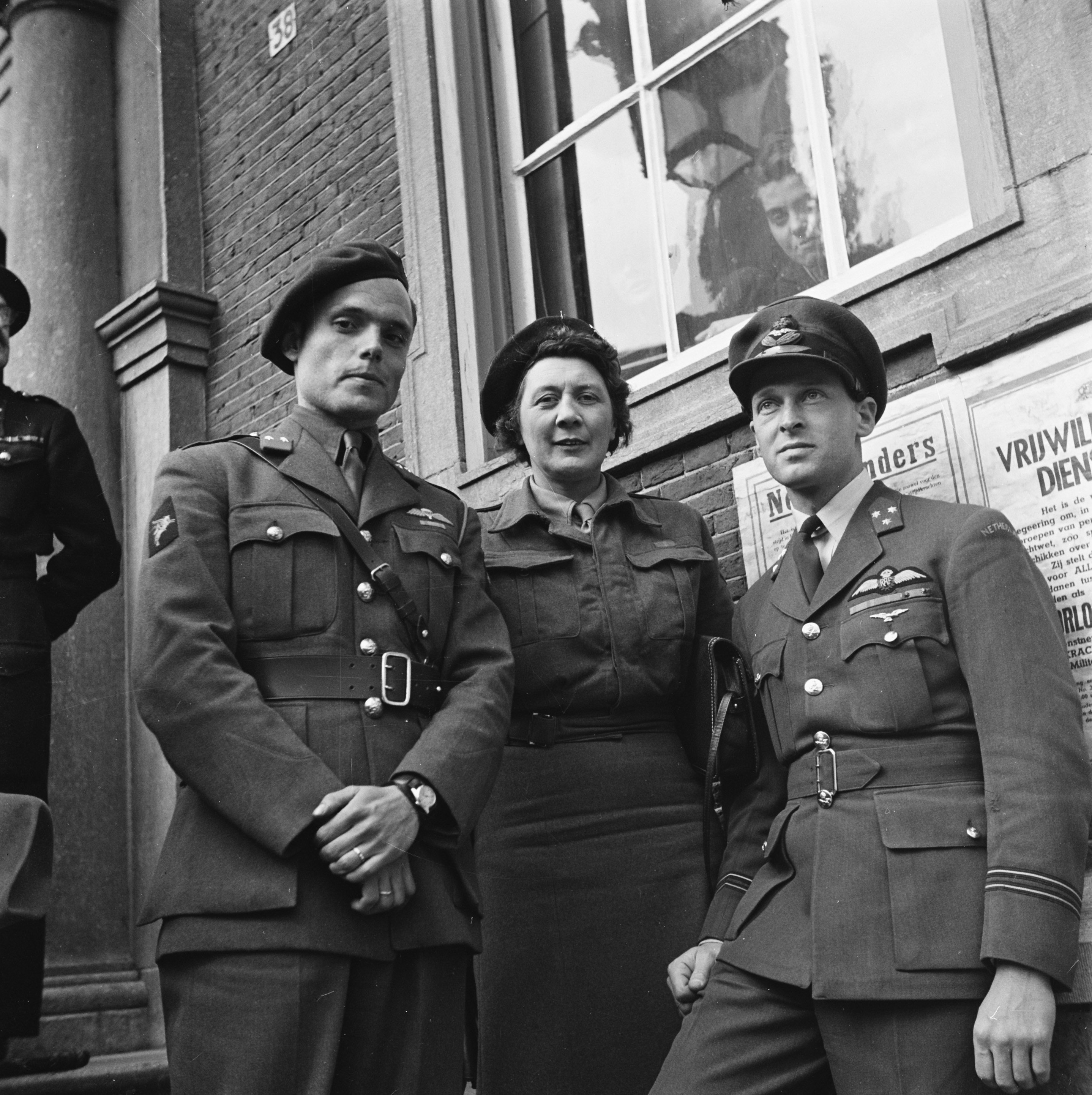 Bezoek van koningin Wilhelmina en prinses Juliana aan Breda in 1945. Adjudanten van koningin Wilhelmina, (vlnr. Peter Tazelaar, Rie Stokvis, Erik Hazelhoff Roelfzema). Collectie: Nationaal Archief / Fotocollectie Anefo Fotograaf: Poll, Willem van de Datum: 02-05-1945 Bestanddeelnummer 900-2749